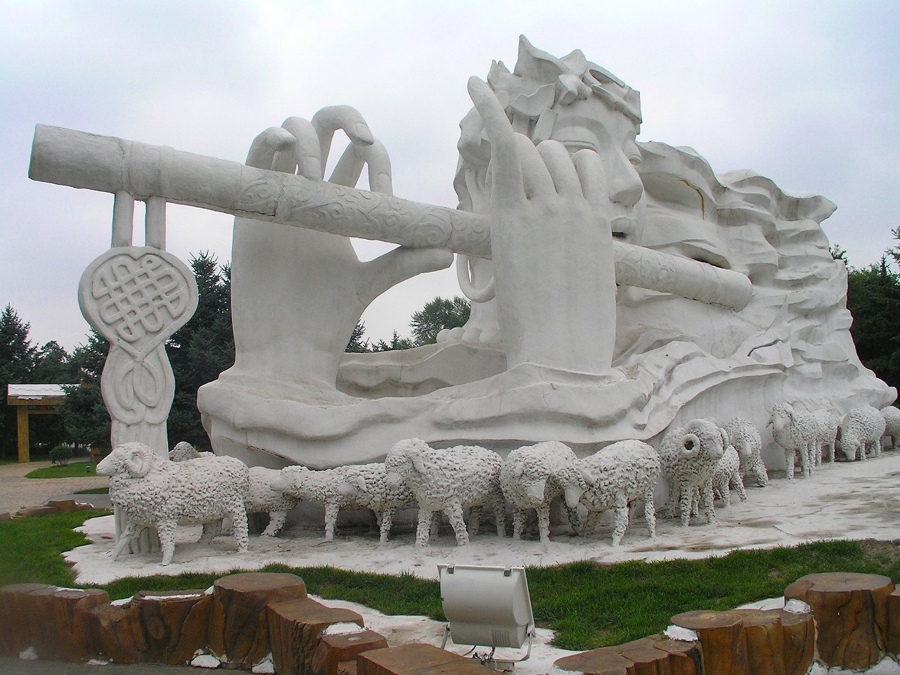 太陽島公園 太陽島に作られたハルピン最大の総合公園である。太陽島の内、38k㎡が公園として整備され、園内には太陽石、水閣雲天、花卉園、丁香園、北方民芸精品館、鶴の群れ、鹿の島、太陽山、太陽湖、荷花湖、姉妹橋、蓮の湖、中日友誼園、室内氷雪芸術館[1]などの20余りの景観や、四季折々の美しい花や木が植えられた広い花壇、池、庭園などが整然と散在している。特に白樺林やヤナギの林は美しい景観を織りなしている。 ハルピンは、1979年に新潟市と姉妹都市となっており、日本庭園も設けられ当時の新潟市長の名の入った和風の門もある。